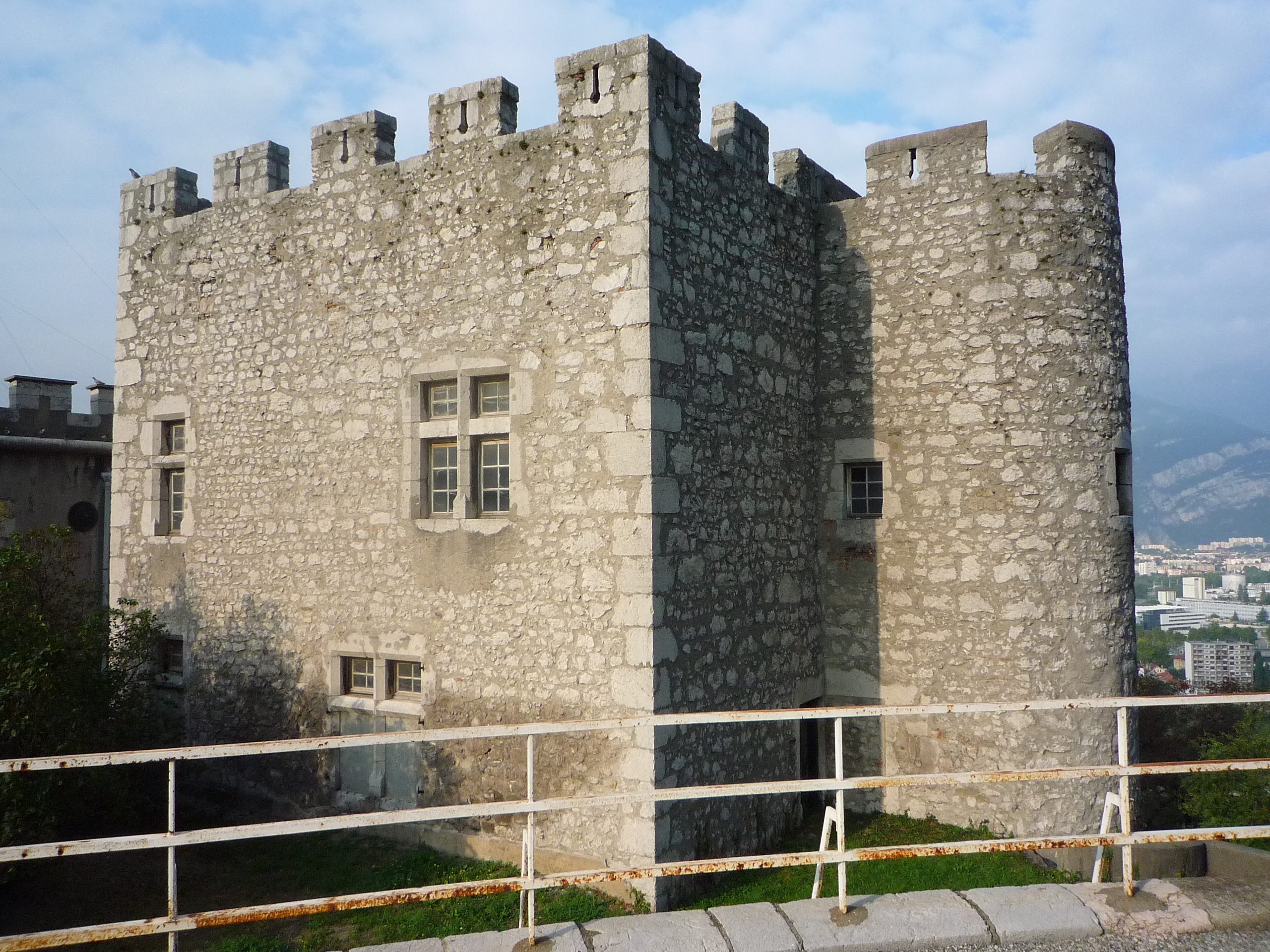 Maison-forte Rabot (XVe siècle) dans l'enceinte de la citadelle Rabot du XIXe siècle. - Grenoble, France